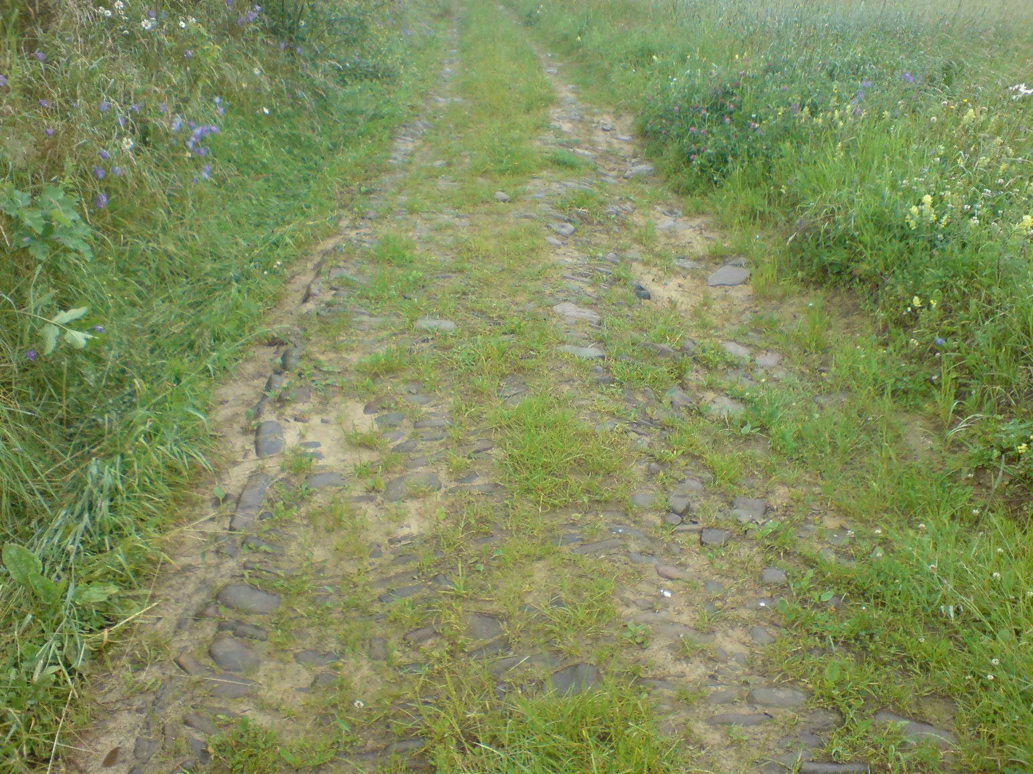 Polna droga